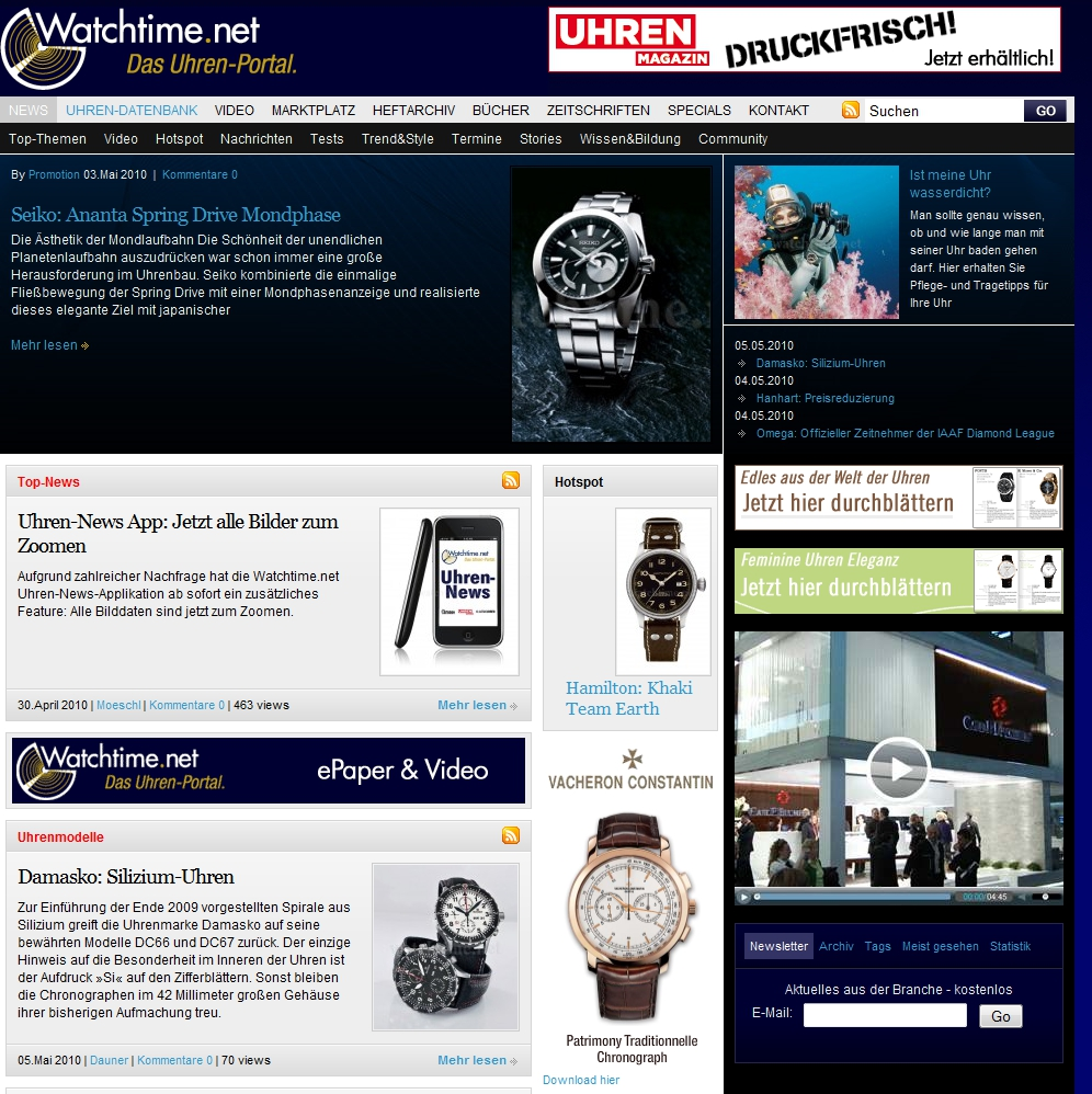 Screenshot des Uhrenportas vom 5.5.2010